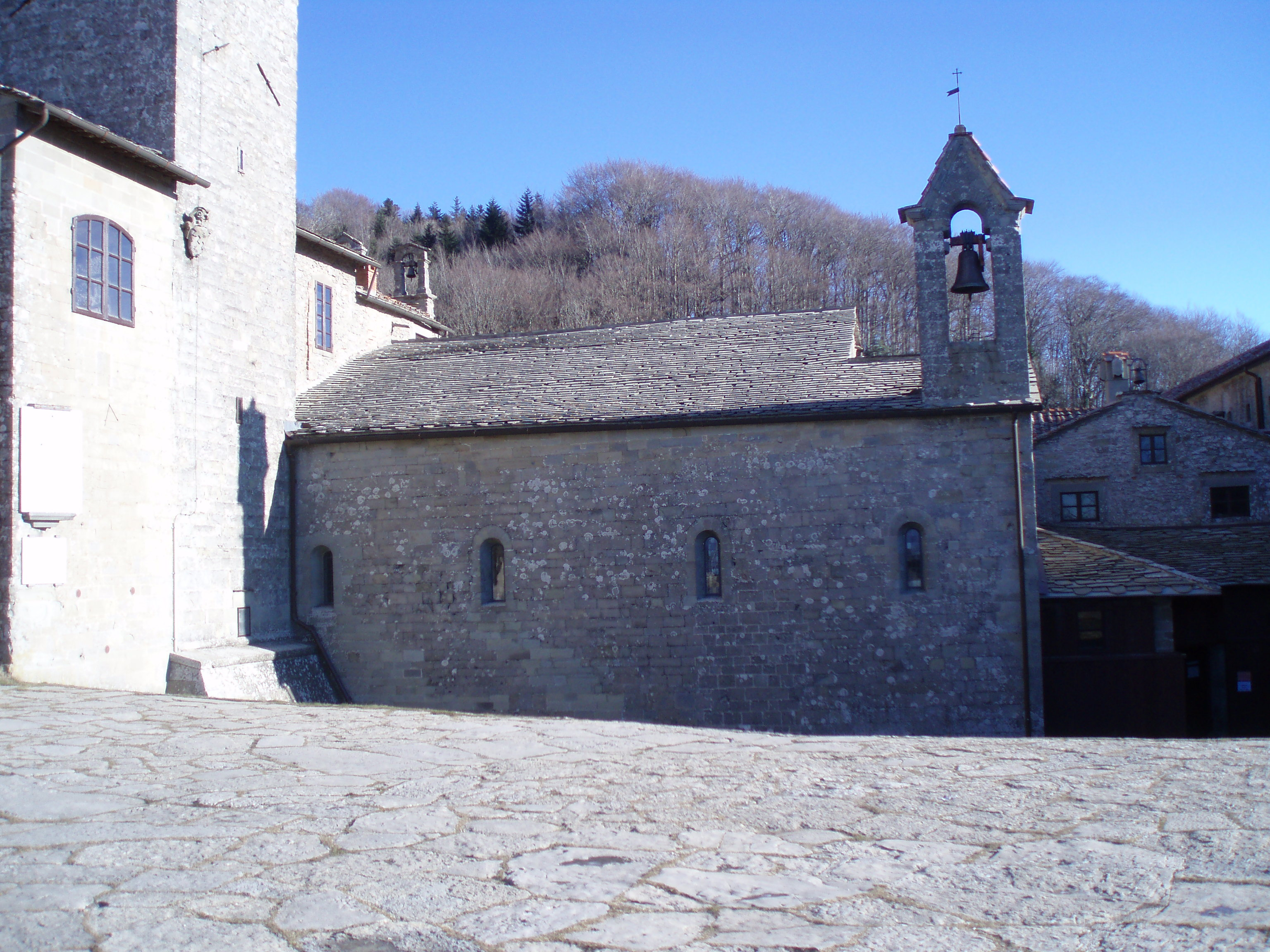 Santuario della Verna - 06 - Il Quadrante.JPG